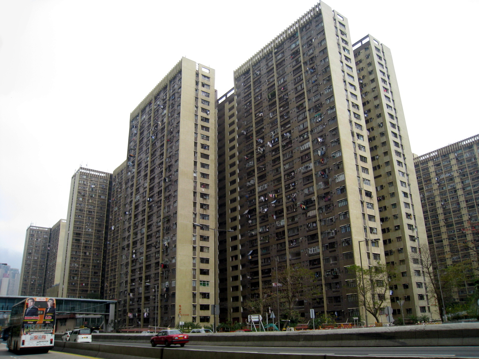 HK Lower Wong Tai Sin Estate